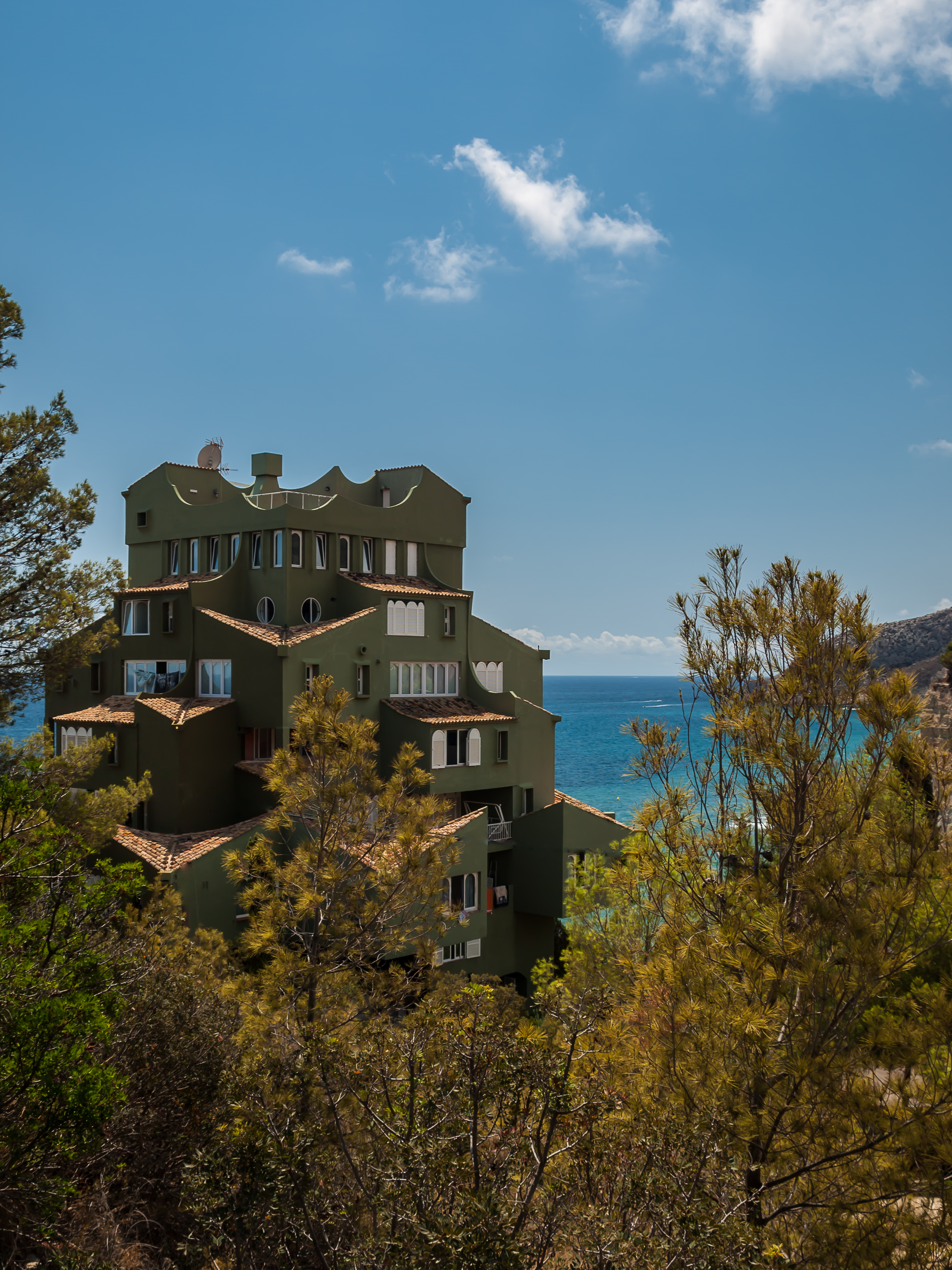 Calp - Edificio Xanadú